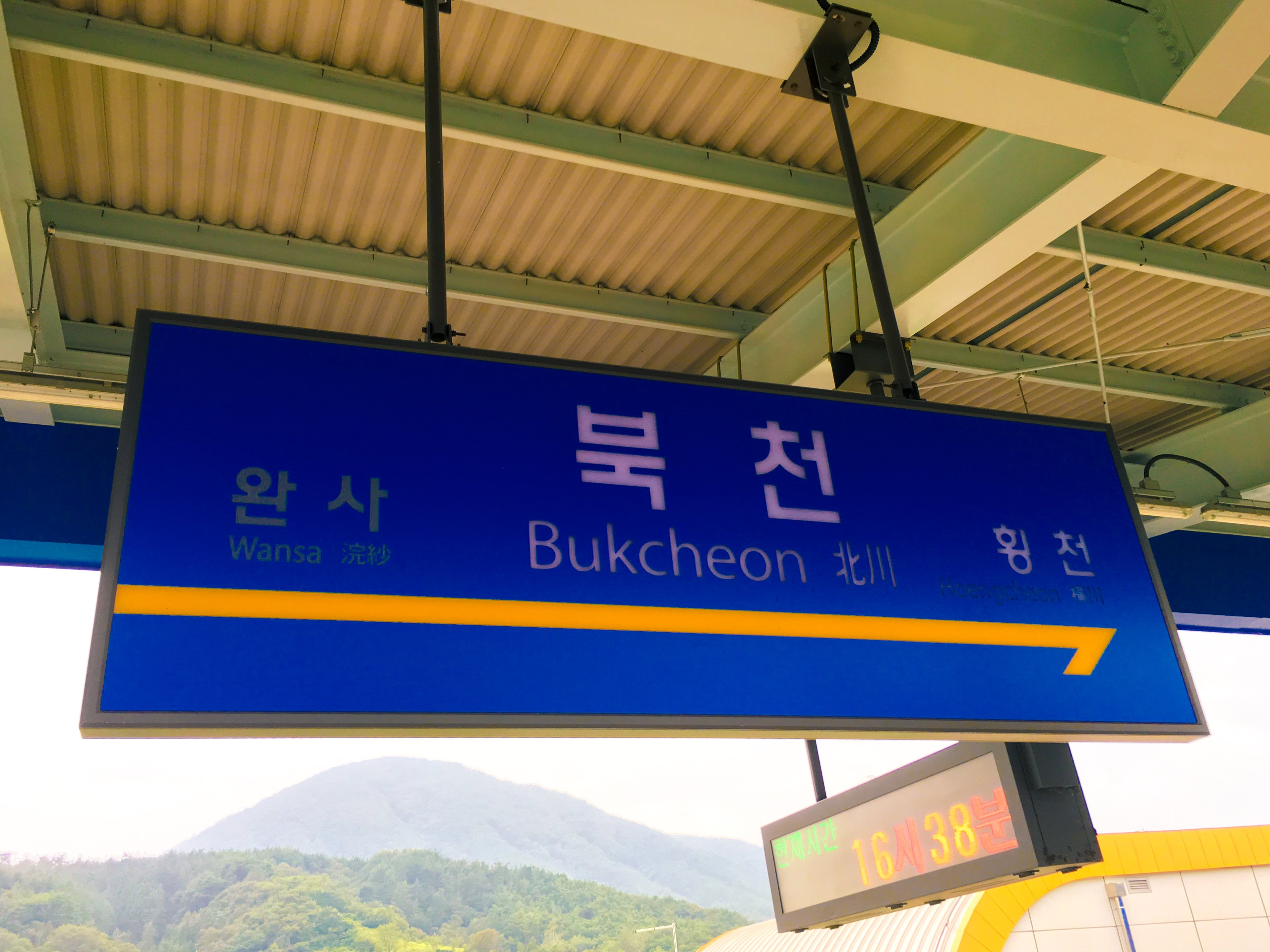 북천역 역명판